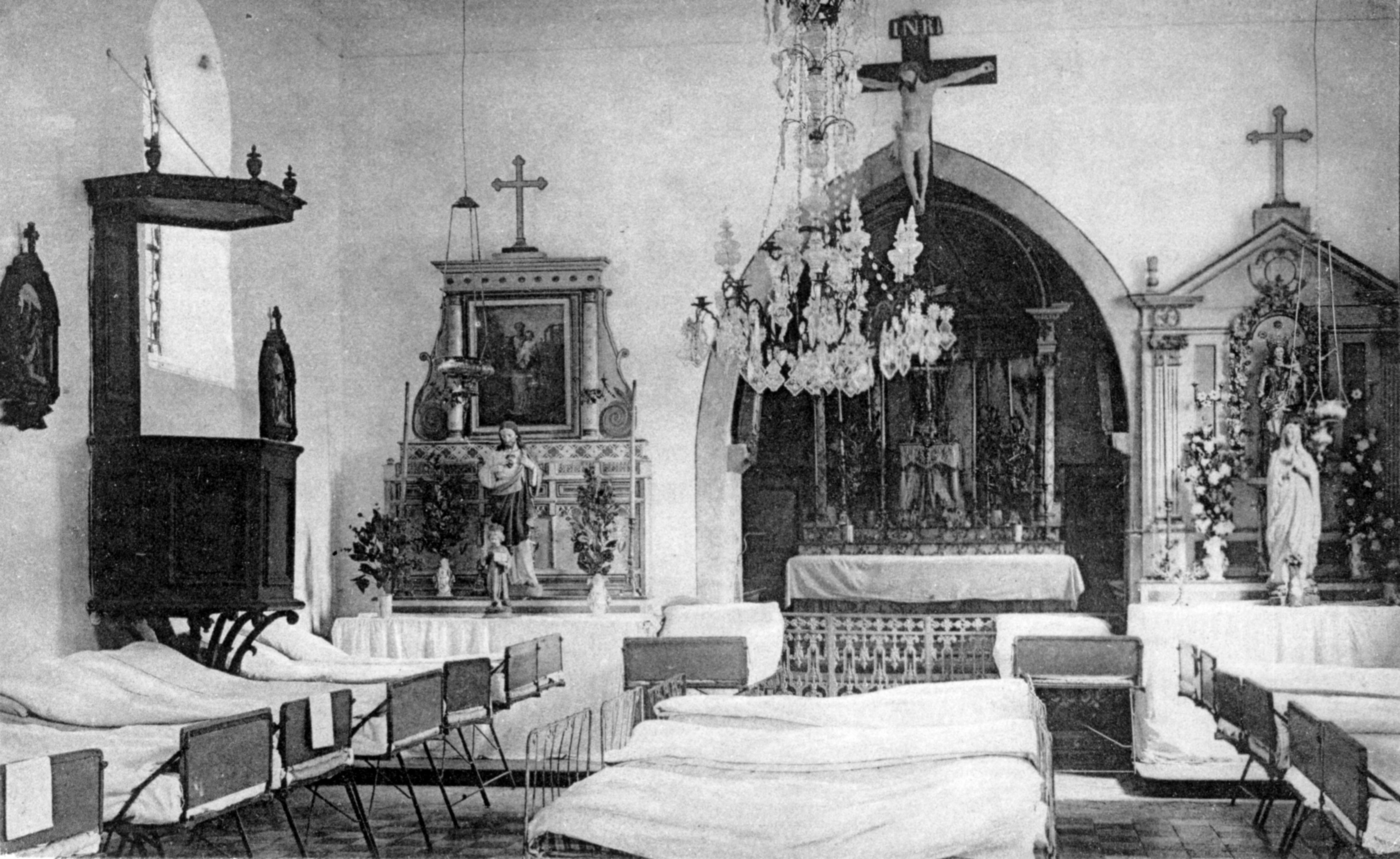 Westlicher Kriegsschauplatz. Kirche in Peuvillers als Lazarett eingerichtet.